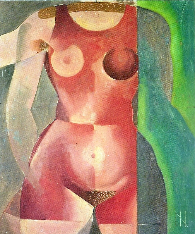 Nu no Cabide (óleo sobre tela; 55 x 46 cm)